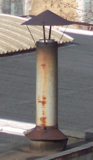 Chapeau chinois sur une cheminée